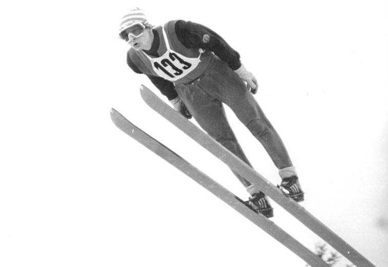 ADN-ZB Demme 4.2.1973 Schmiedefeld: Auch zweiter Sprunglauftitel für Hans-Georg Aschenbach Zum Abschluß der XXV. DDR-Skimeisterschaften in den Nordischen Disziplinen gewann am 4.2.1973 in Schmiedefeld Hans-Georg Aschenbach vom Ask Vorwärts Brotterode auch den Sprunglauf auf der Normalschanze, nachdem er am 3.2.1973 in Oberhof überlegener Meister auf der Großen Schanze (unser Bild) geworden war.